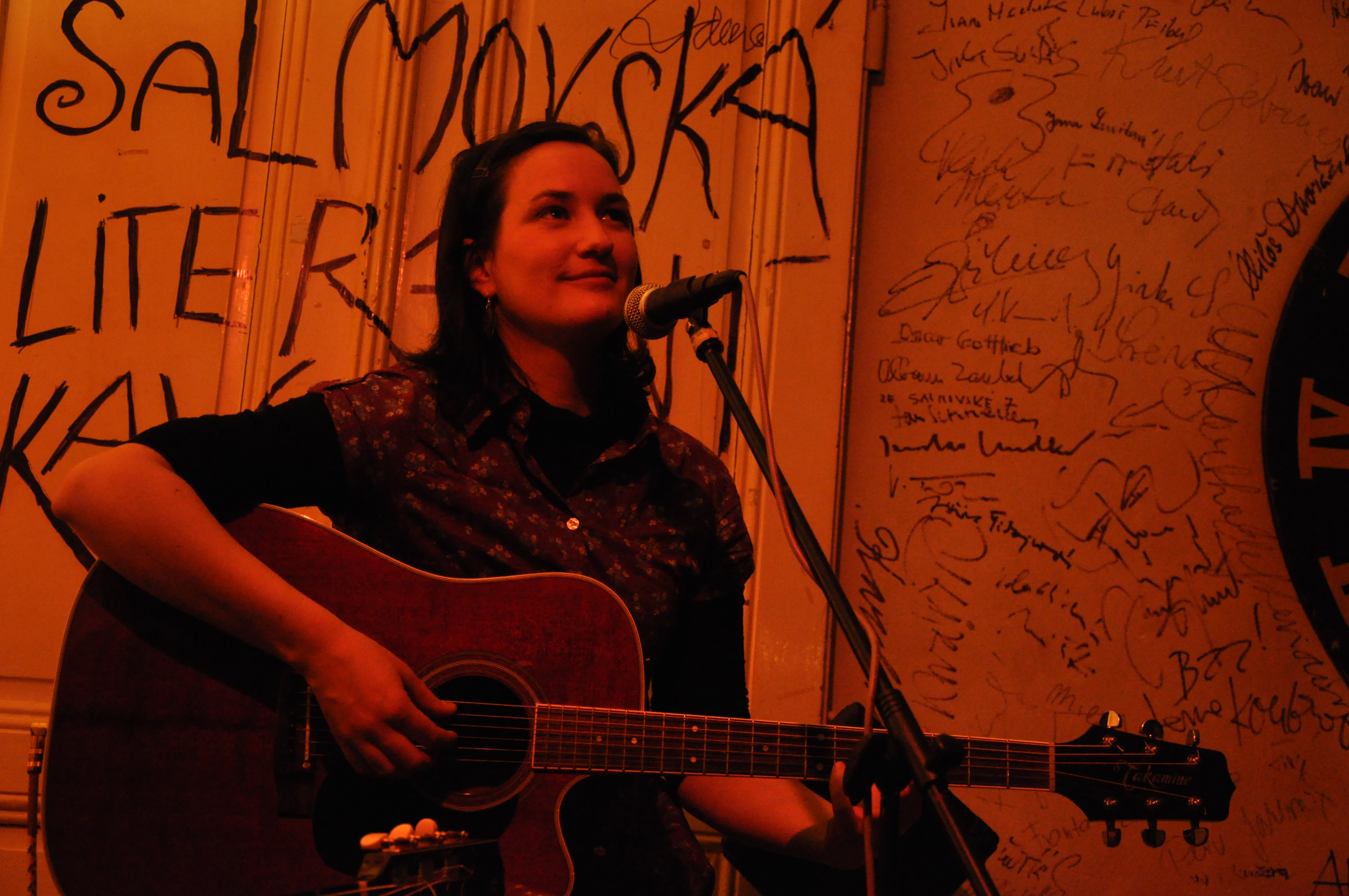 Martina Trchová na koncertě v pražské Salmovské literární kavárně 8. února 2010